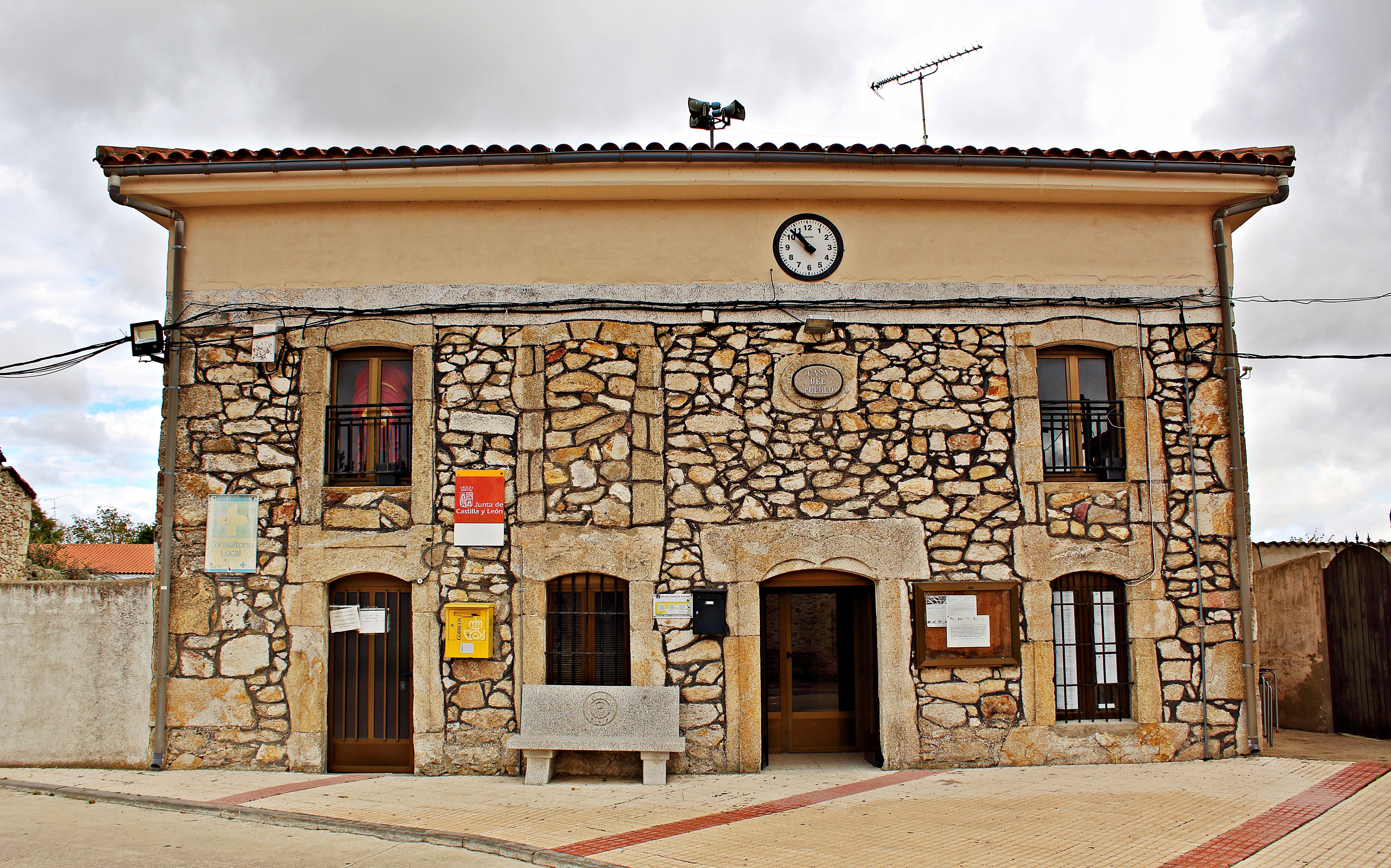 El Arco municipio de Salamanca, comarca Tierra de Ledesma, provincia de Salamanca.